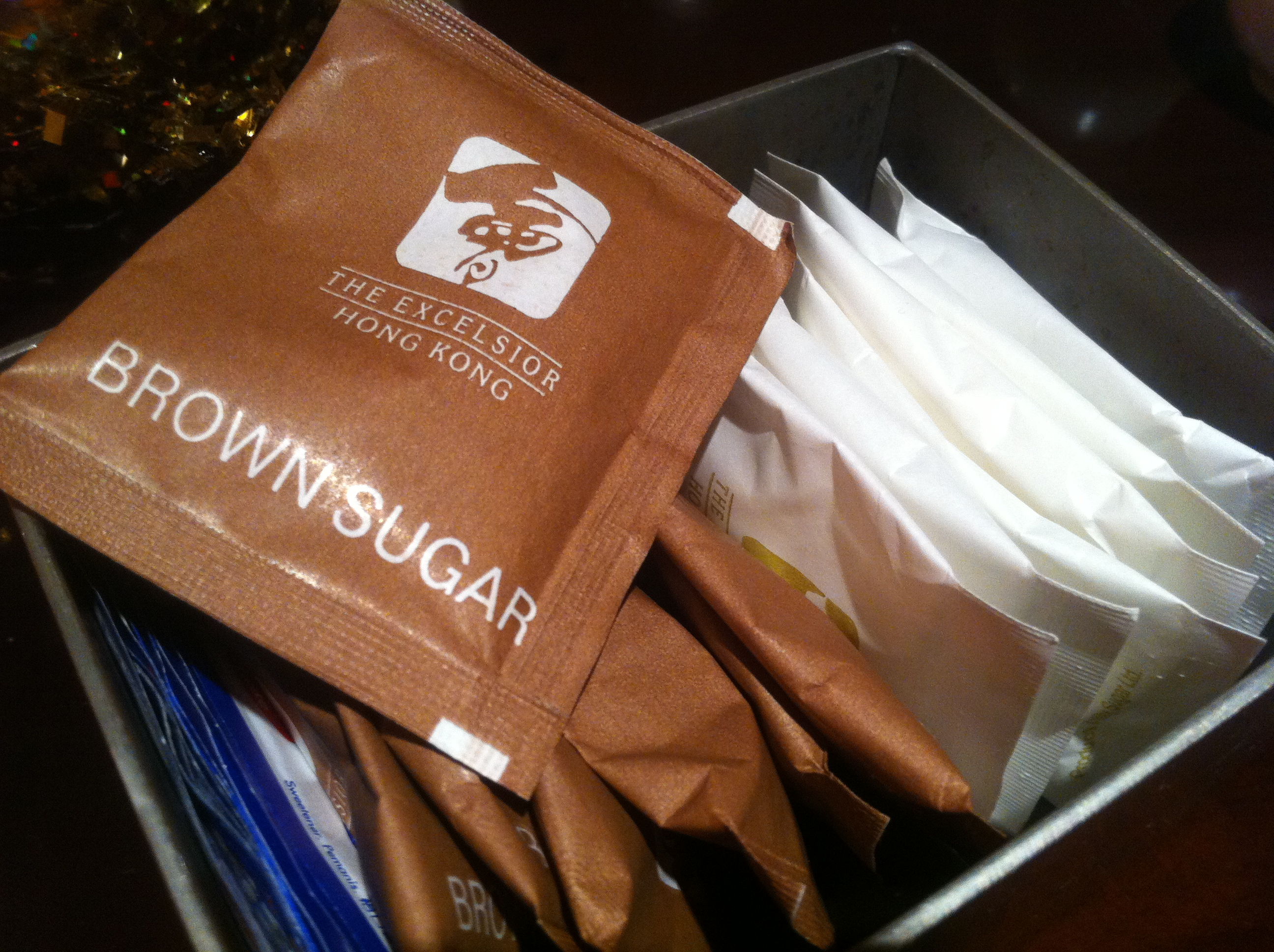 中文（香港）: 香港怡東酒店 食肆